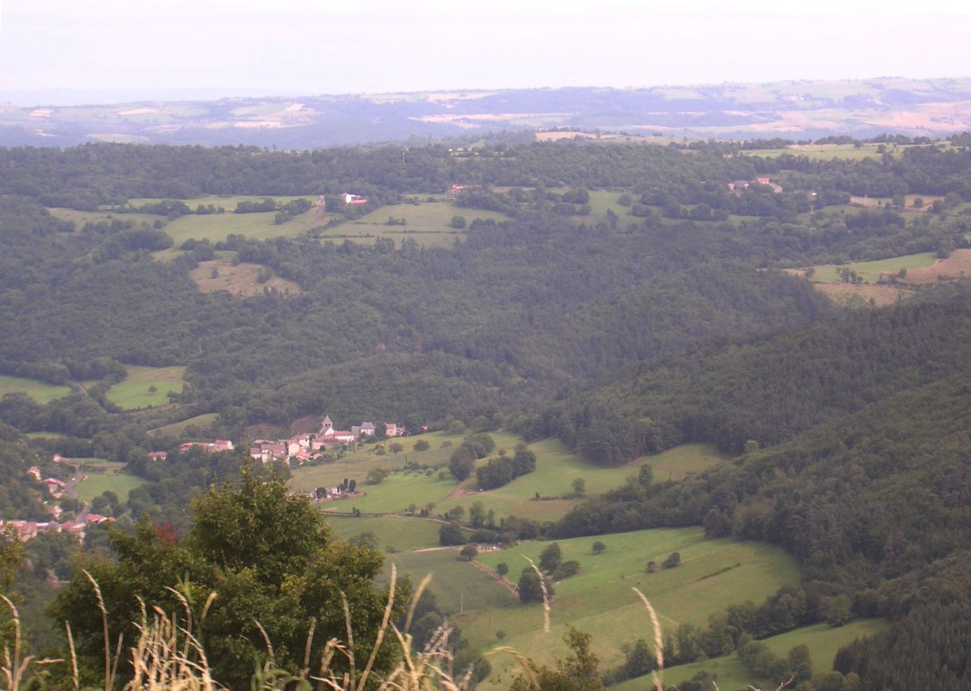 Auriac l'Eglise (Cantal)